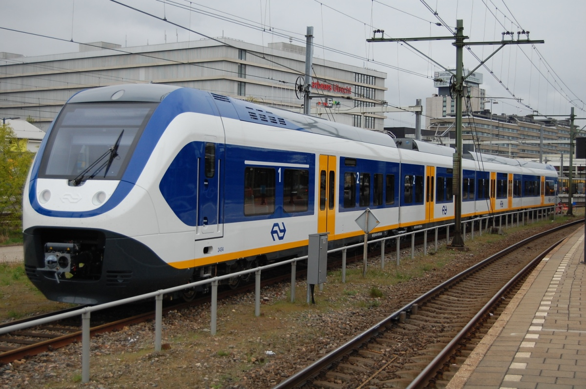 2434,Utrecht.